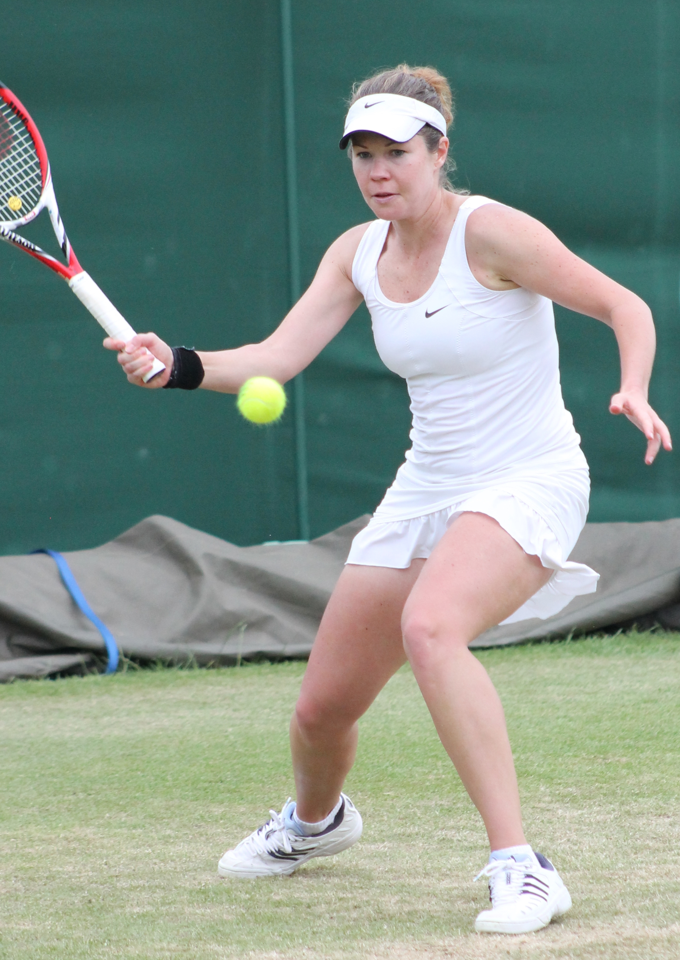 Eva Birnerová